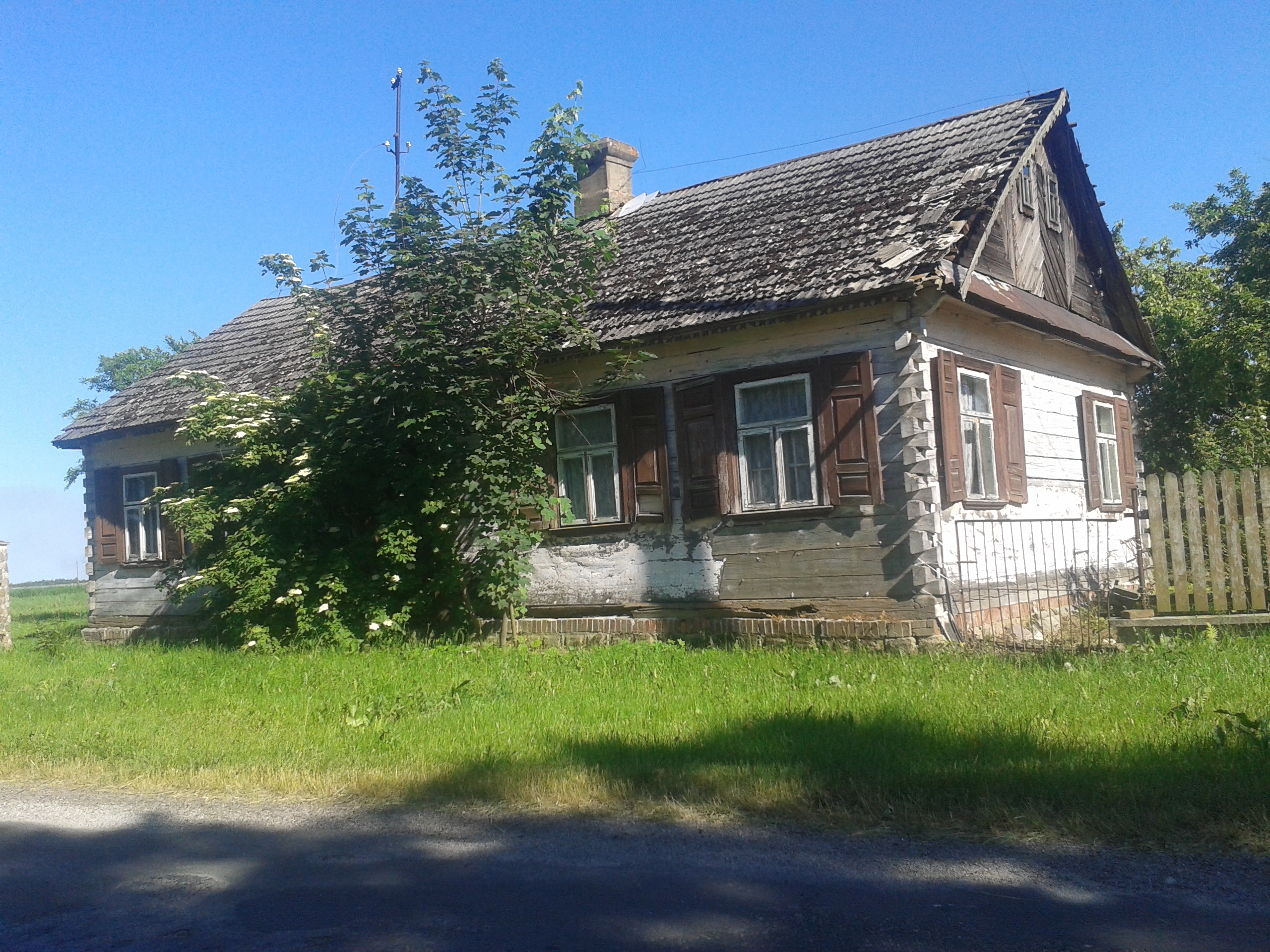 Dom mieszkalny w Krzywowierzbie